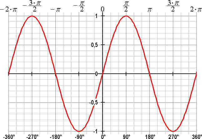 Graf over sinus som en funktion af vinkler fra -360 til 360 grader. Desuden forsynet med en sekundær skala langs x-aksen, som angiver vinklern i radianer